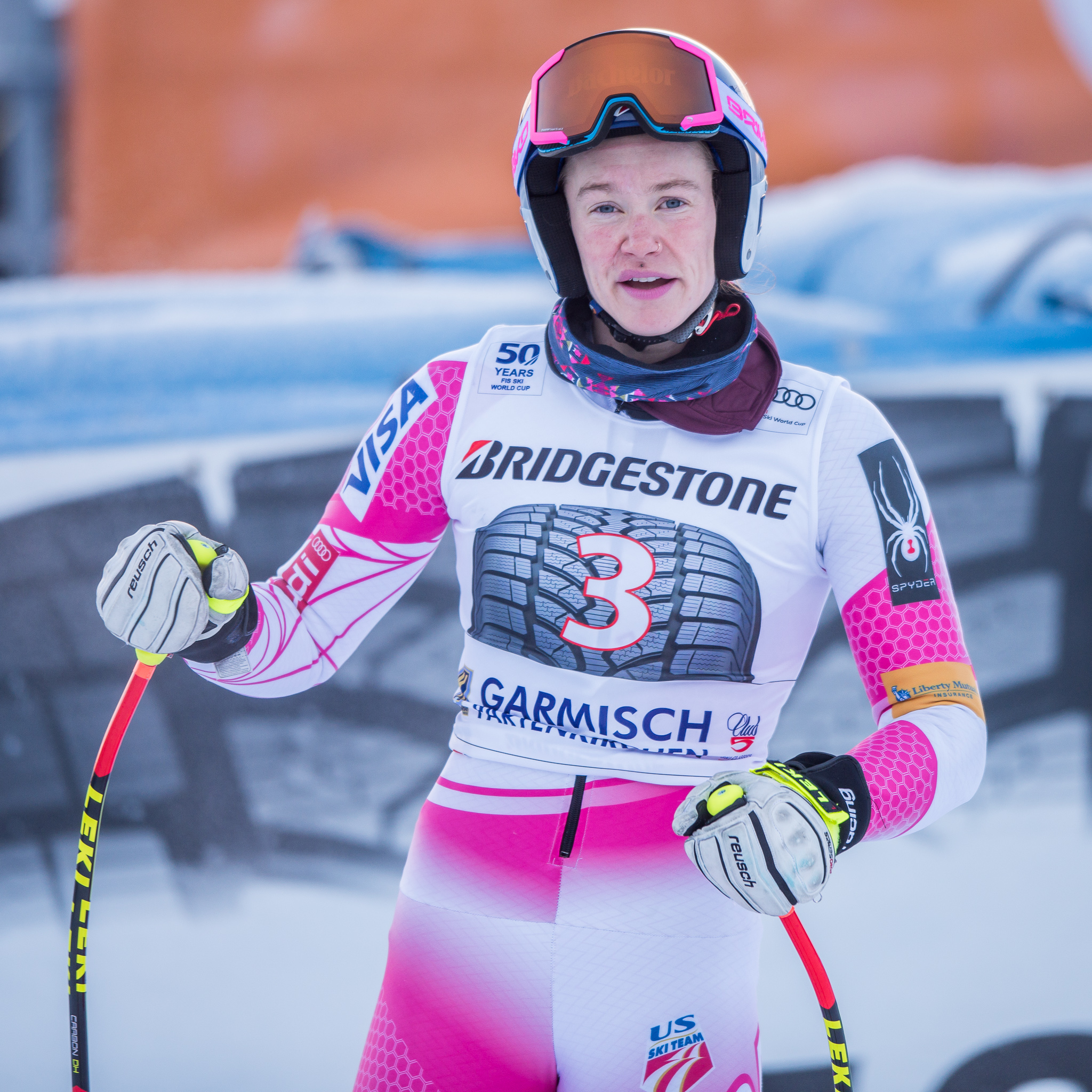 64. Kandahar Rennen,Audi FIS Ski Weltcup Garmisch-Partenkirchen,Damen Abfahrt,Kandahar,Ladies Downhill,Laurenne Ross